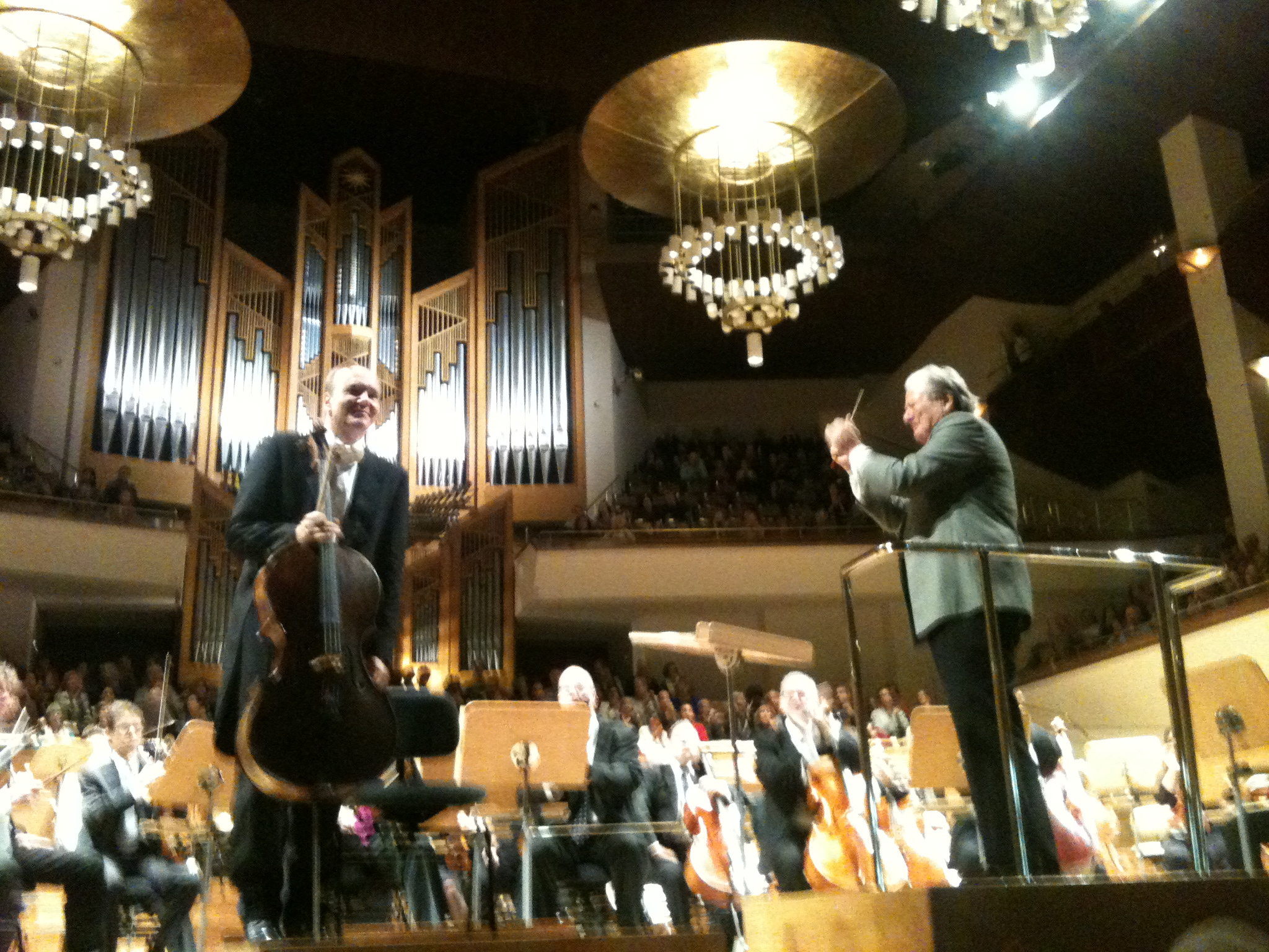 Truls Mørk, Sir Neville Marriner y la Orquesta Nacional de España tras la interpretación del concierto para violonchelo de Elgar. Auditorio Nacional, Madrid, 1 de febrero de 2015.